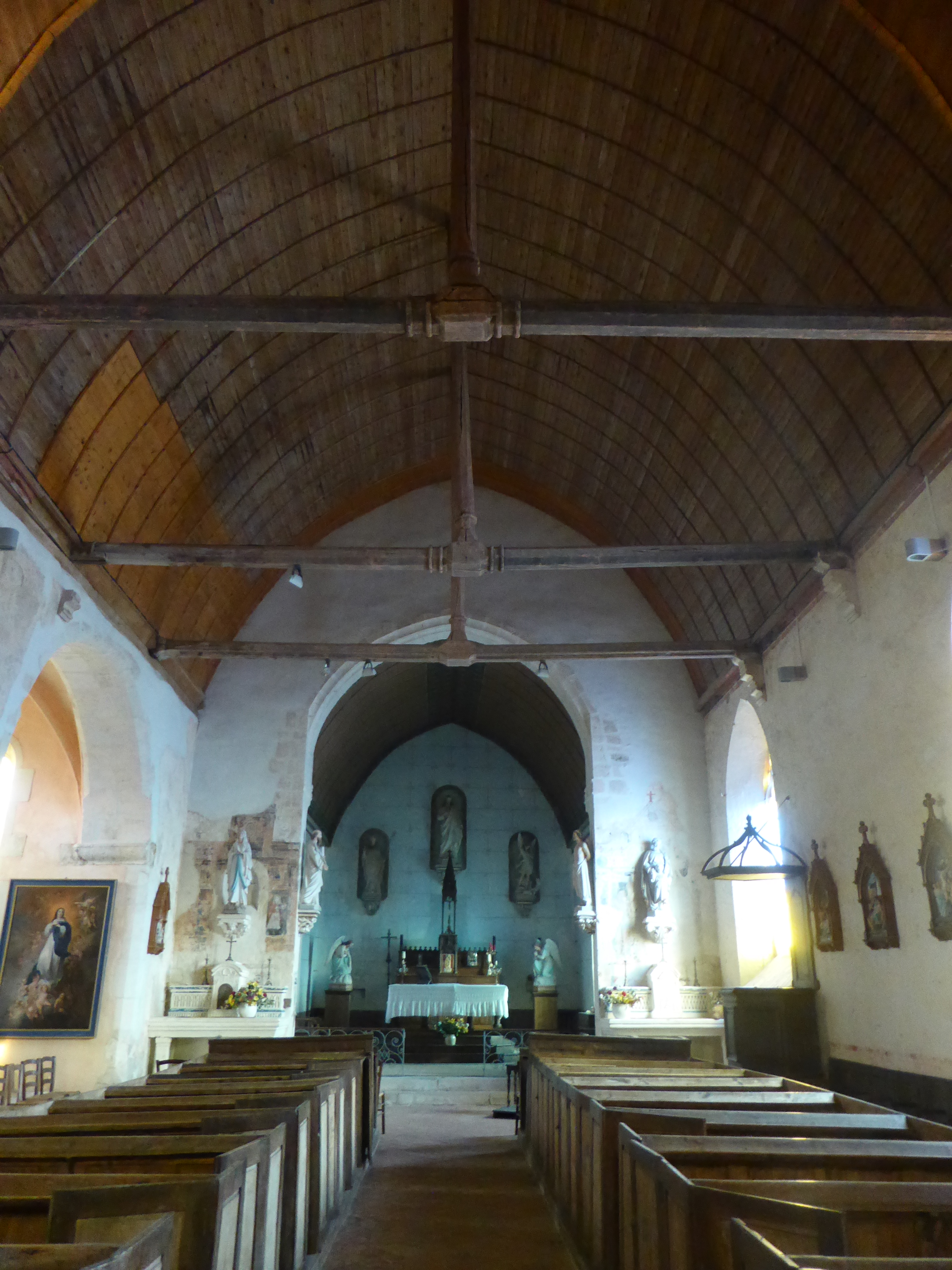 Nef de l'église Saint-Rémi de Montgaudry, dans l'Orne.